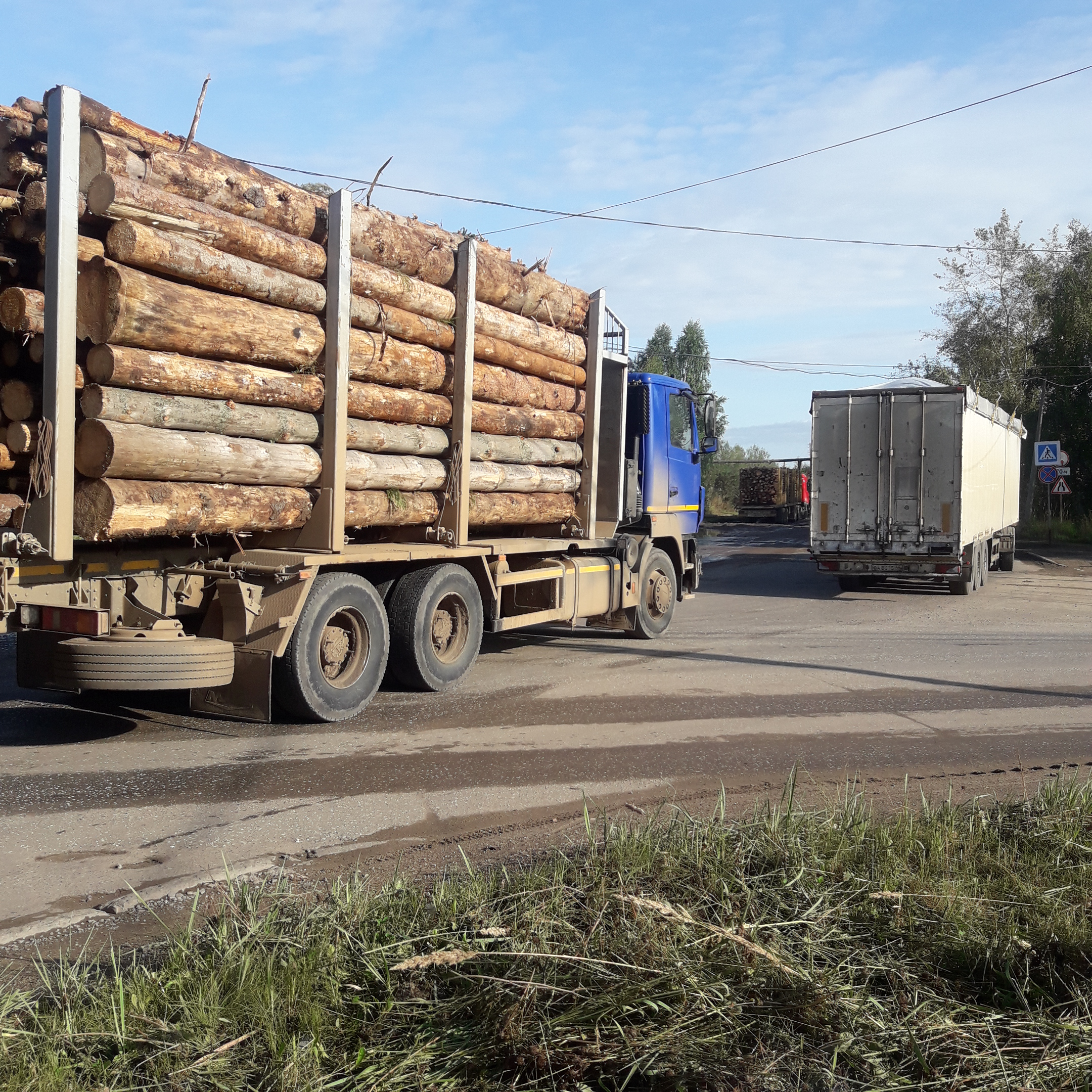 Лесовоз с осиной и щеповоз в Коряжме